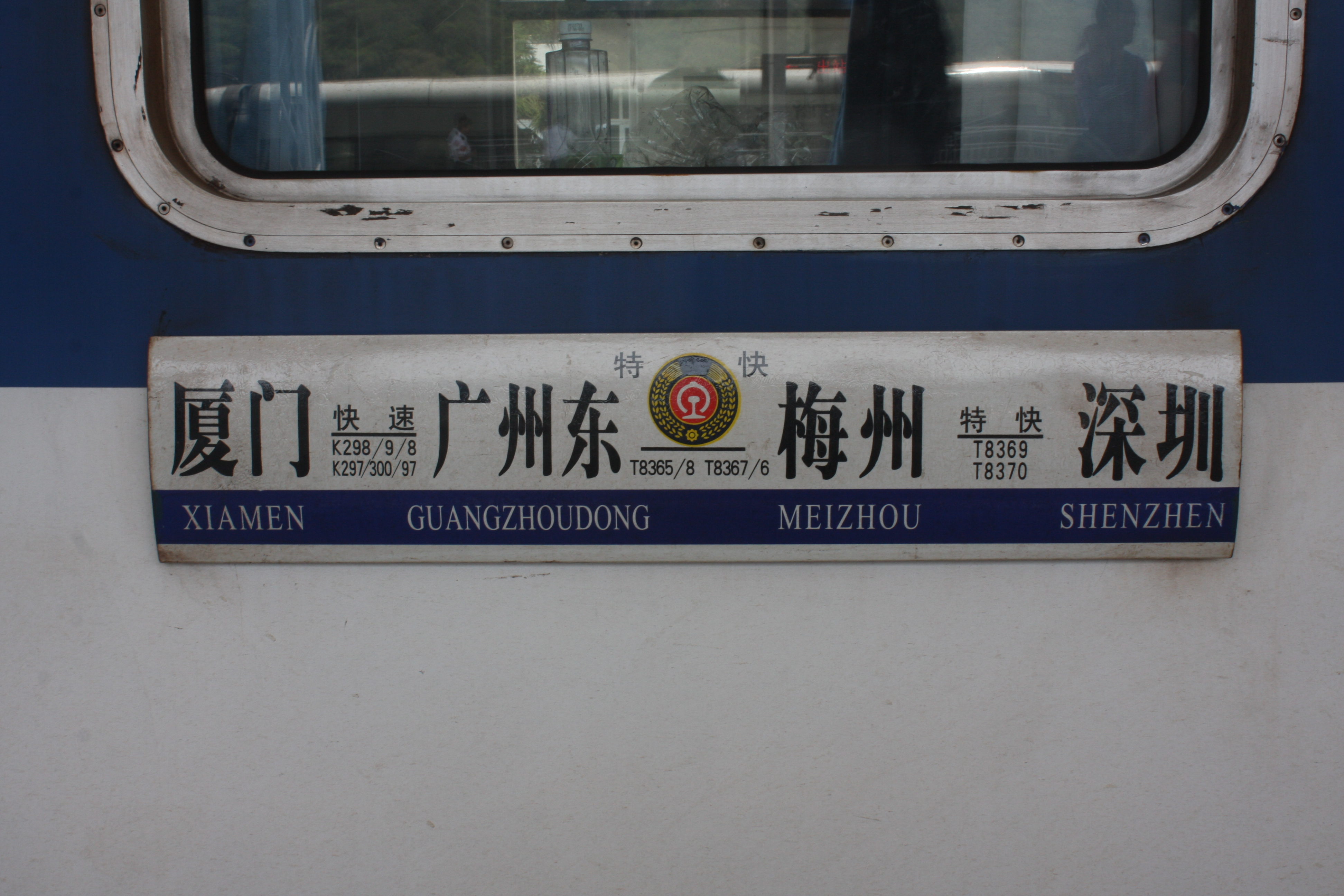 广州东－厦门K297/300、K298/299次列车、广州东－梅州T8365/8368、T8367/8366次列车以及深圳－梅州T8369/8370次列车共用水牌